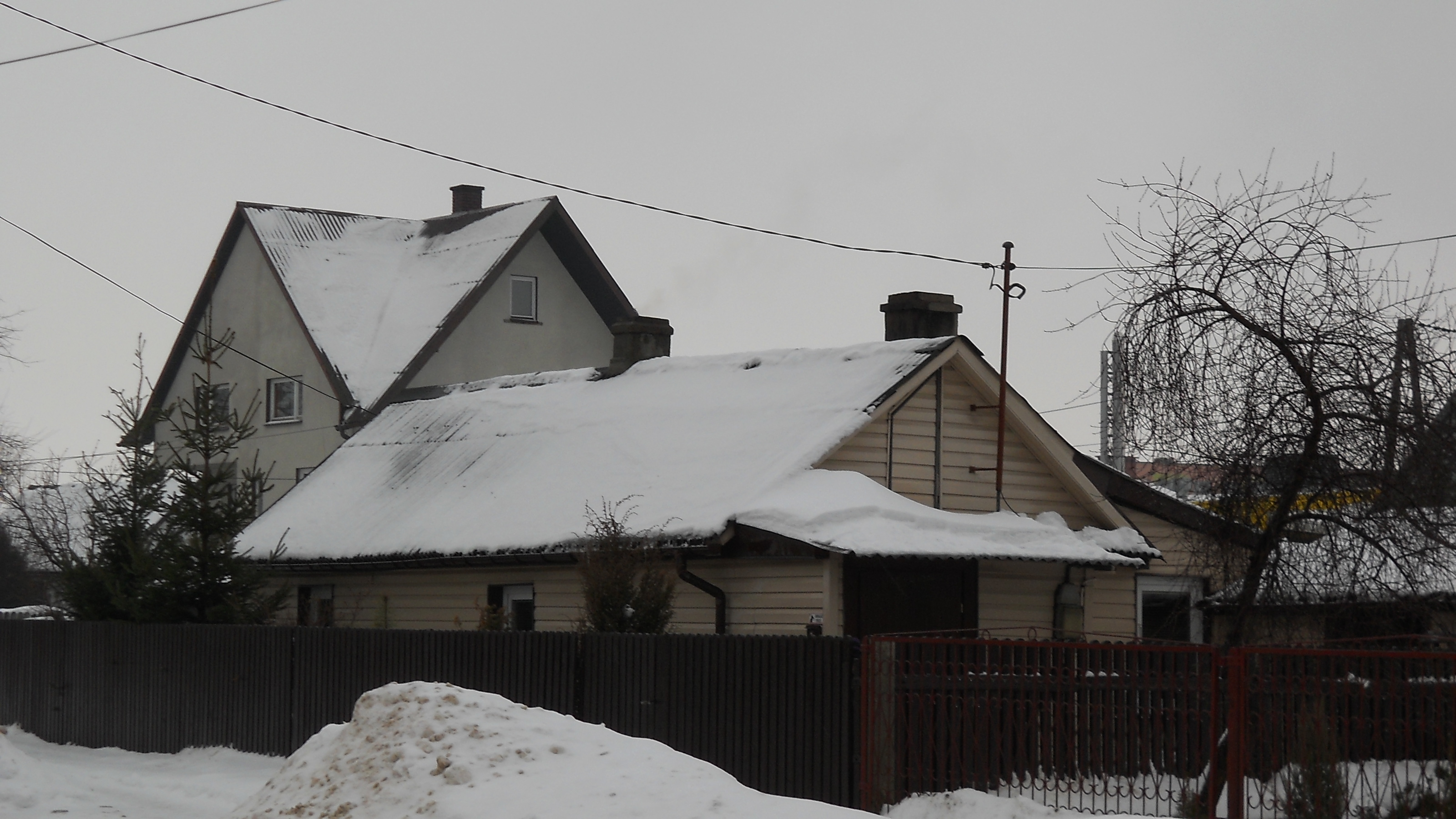 Dom przy ulicy 11 listopada